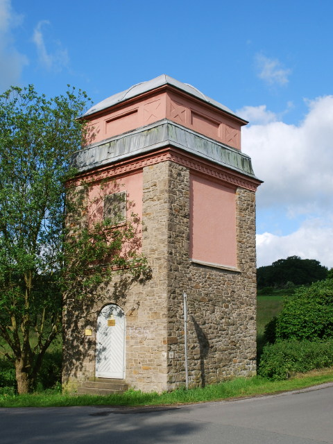 Tranformatorenstation, 10-kV-Station Esborn (AVU), Esborner Straße 46/Böllbergstraße, Wetter-Esborn This is a photograph of an architectural monument.